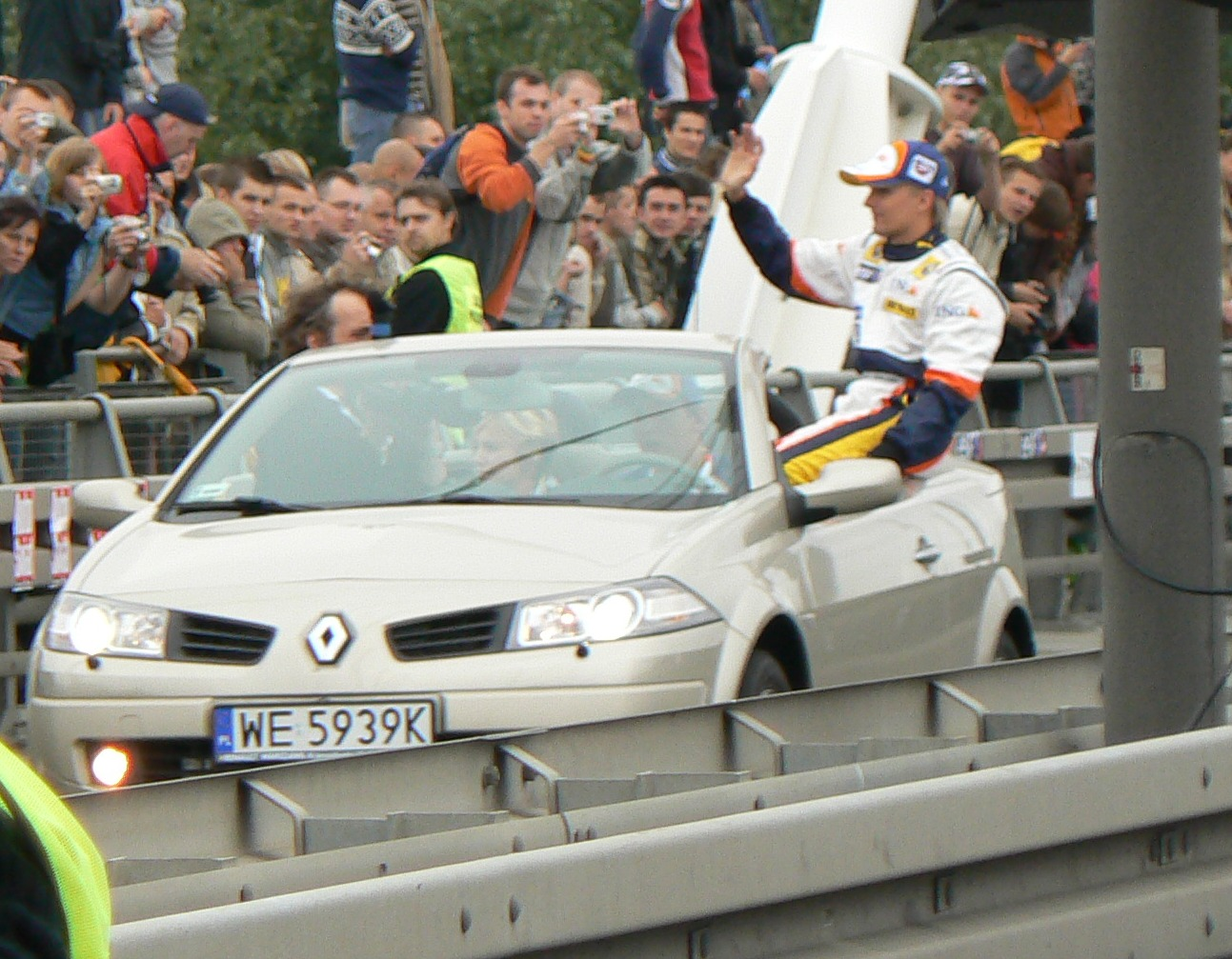 Heikki Kovalainen during F1 Roadshow in Warsaw